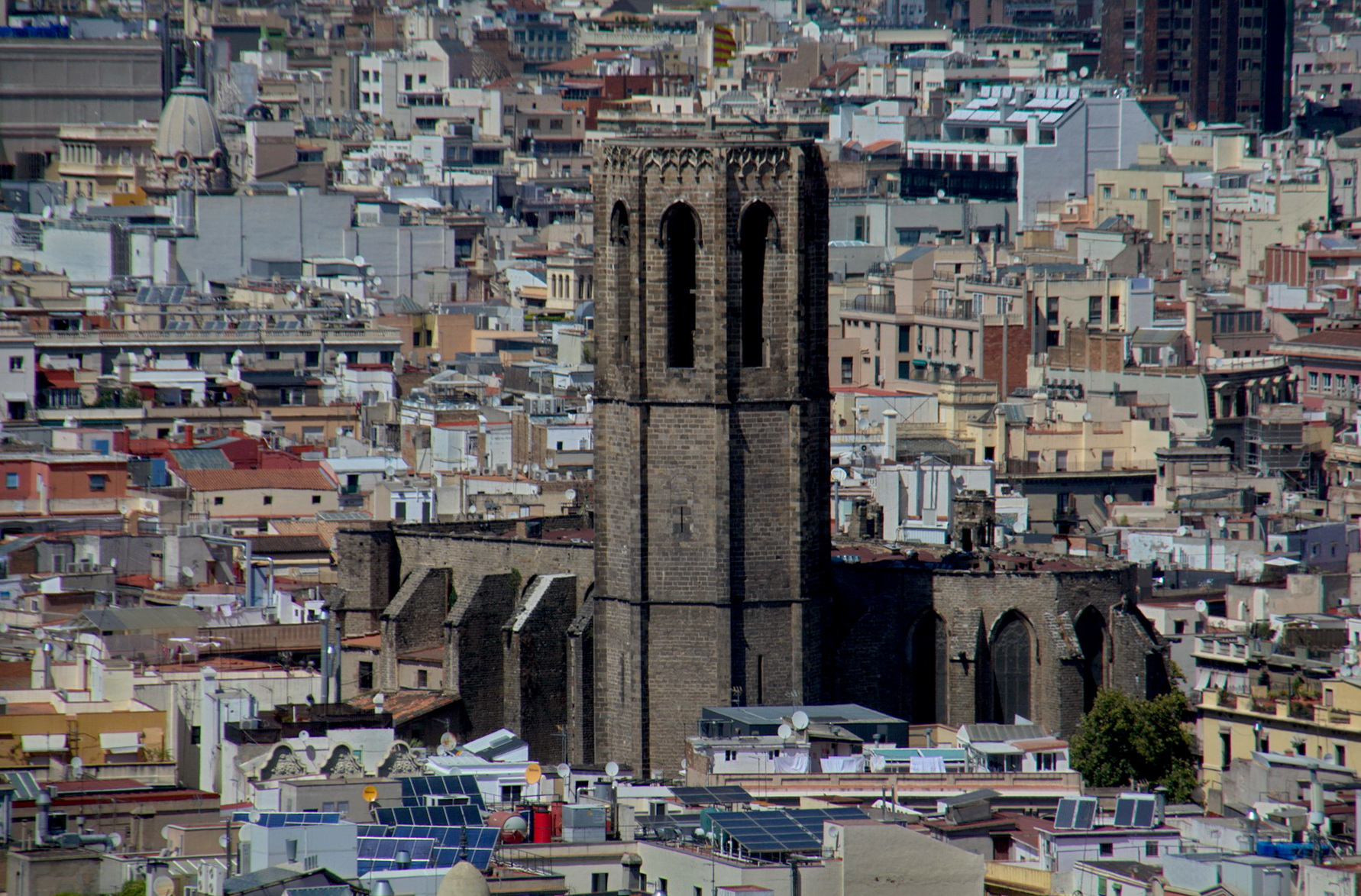 Santa Maria del Pi (Barcelona)